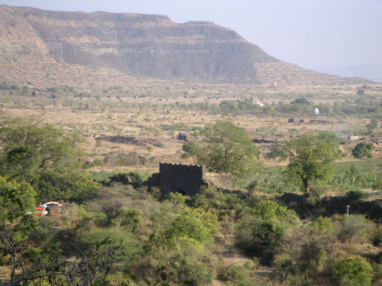 Maharashtra